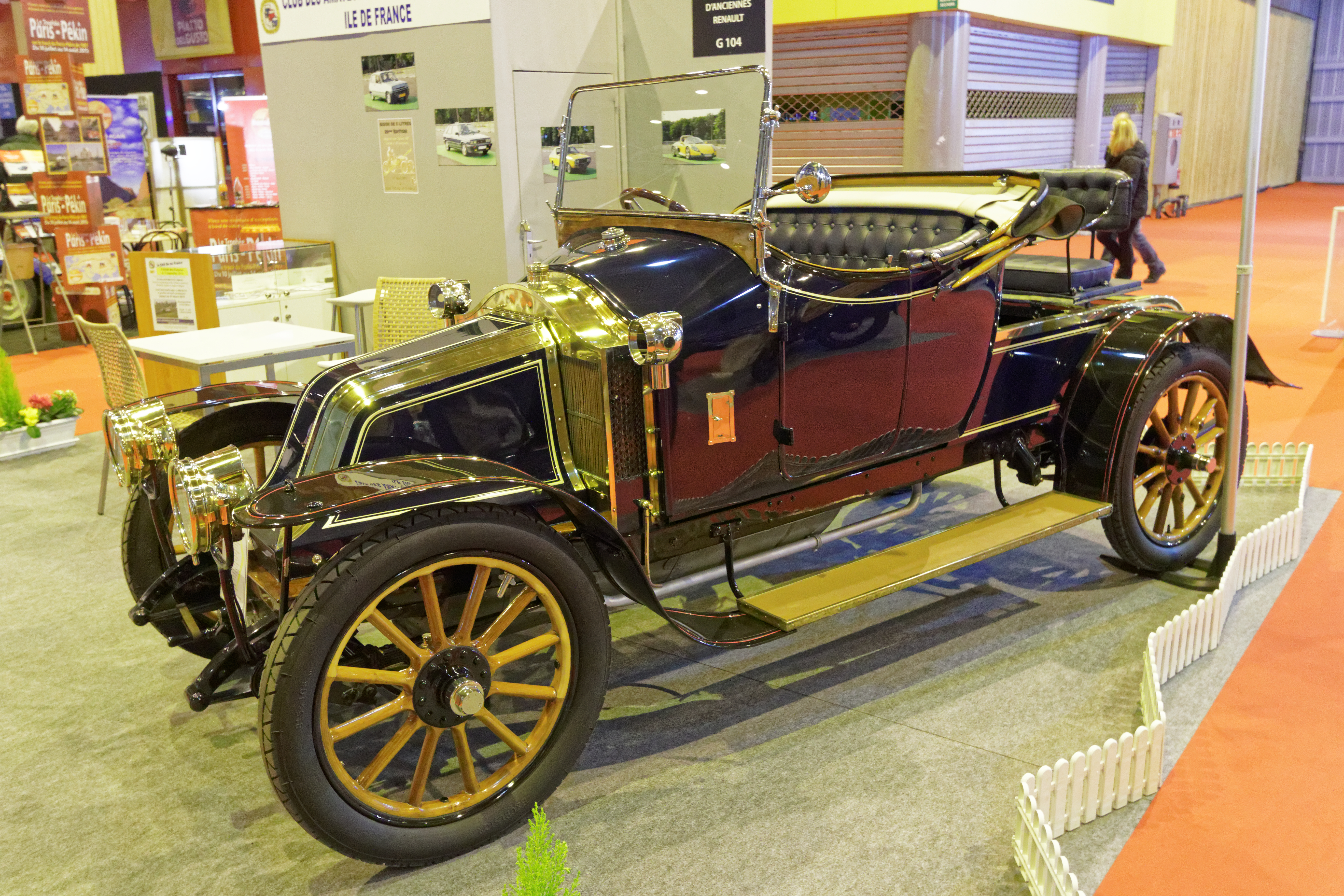 Une des voiture présentée lors du salon Rétromobile de Paris 2015